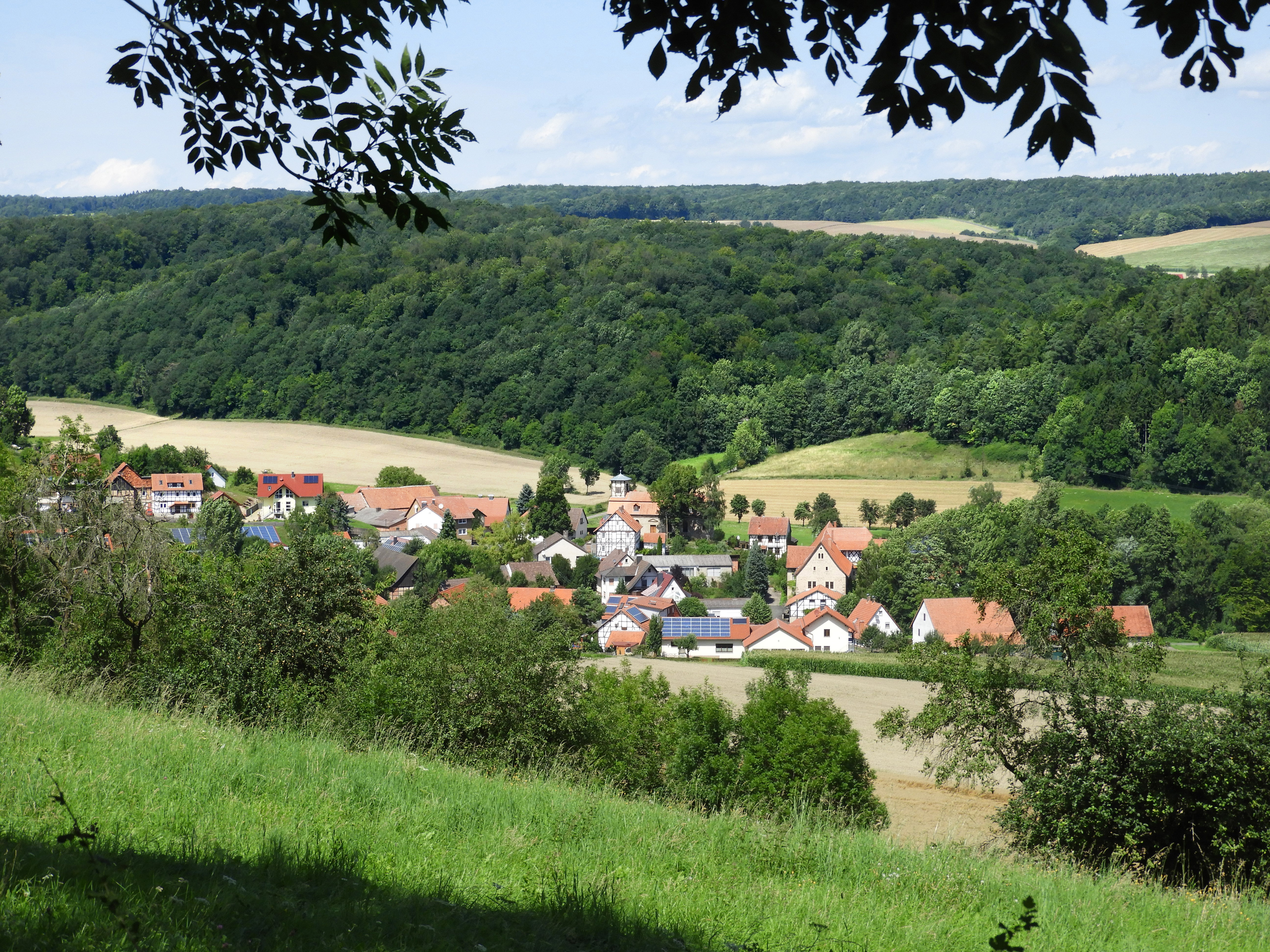 Lüderbach ist ein Ortsteil der Gemeinde Ringgau im nordhessischen Werra-Meißner-Kreis, der knapp zwei Kilometer von der früheren innerdeutschen Grenze und heutigen Landesgrenze zu Thüringen entfernt liegt.